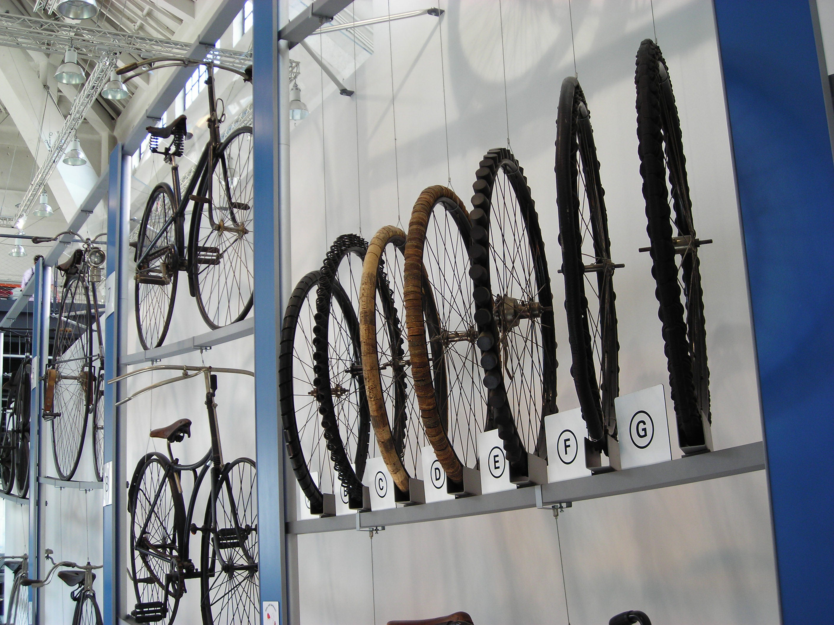 Historische Fahrrad-Notbereifungen in (Nach-)Kriegszeiten aufgrund Gummiknappheit A: Reifen aus spiralförmig gewundenem Stahlblech (1916-1919) B: Rad mit Spiralfederbereifung (1916-1919) C: Rad mit Korkscheibenauflage (um 1945) D: Rad mit Gummischeiben (um 1945) E: Rad mit Gummi-Muffenauflage (um 1945) F: Rad mit Federn und Vollgummireifen (um 1945) G: Reifen mit Federn und Vollgummibelag (um 1945) (Text der Erklärung: Deutsches Museum Verkehrszentrum) Exponate im Deutschen Museum Verkehrszentrum München, Halle III, EG